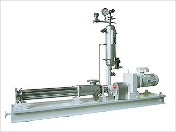 Bomba Bornemann a tornillo